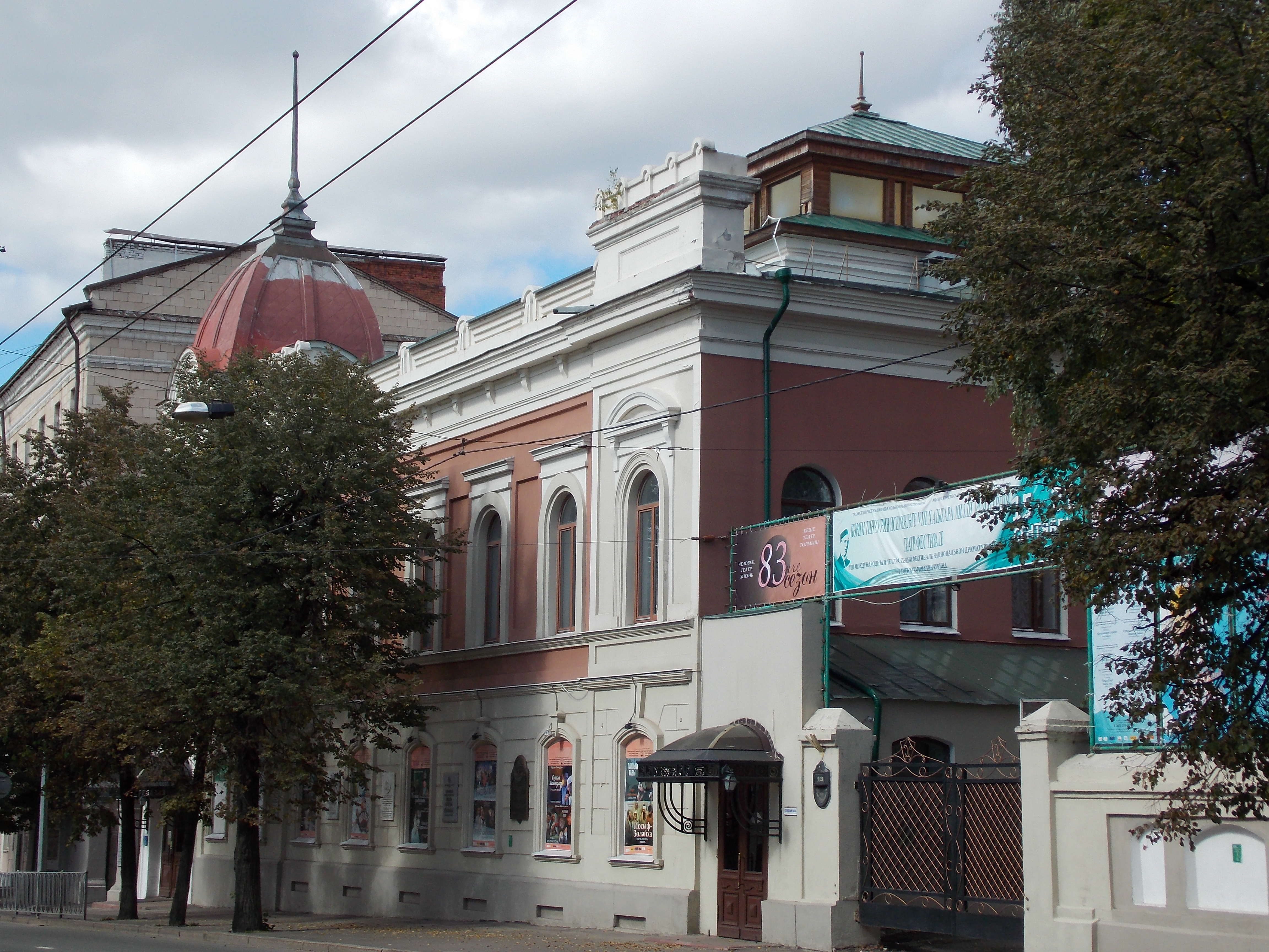 Дом, в котором жил татарский композитор Салих Сайдашев и выступал Маяковский В.В.: улица Горького, 13, Казань, Татарстан